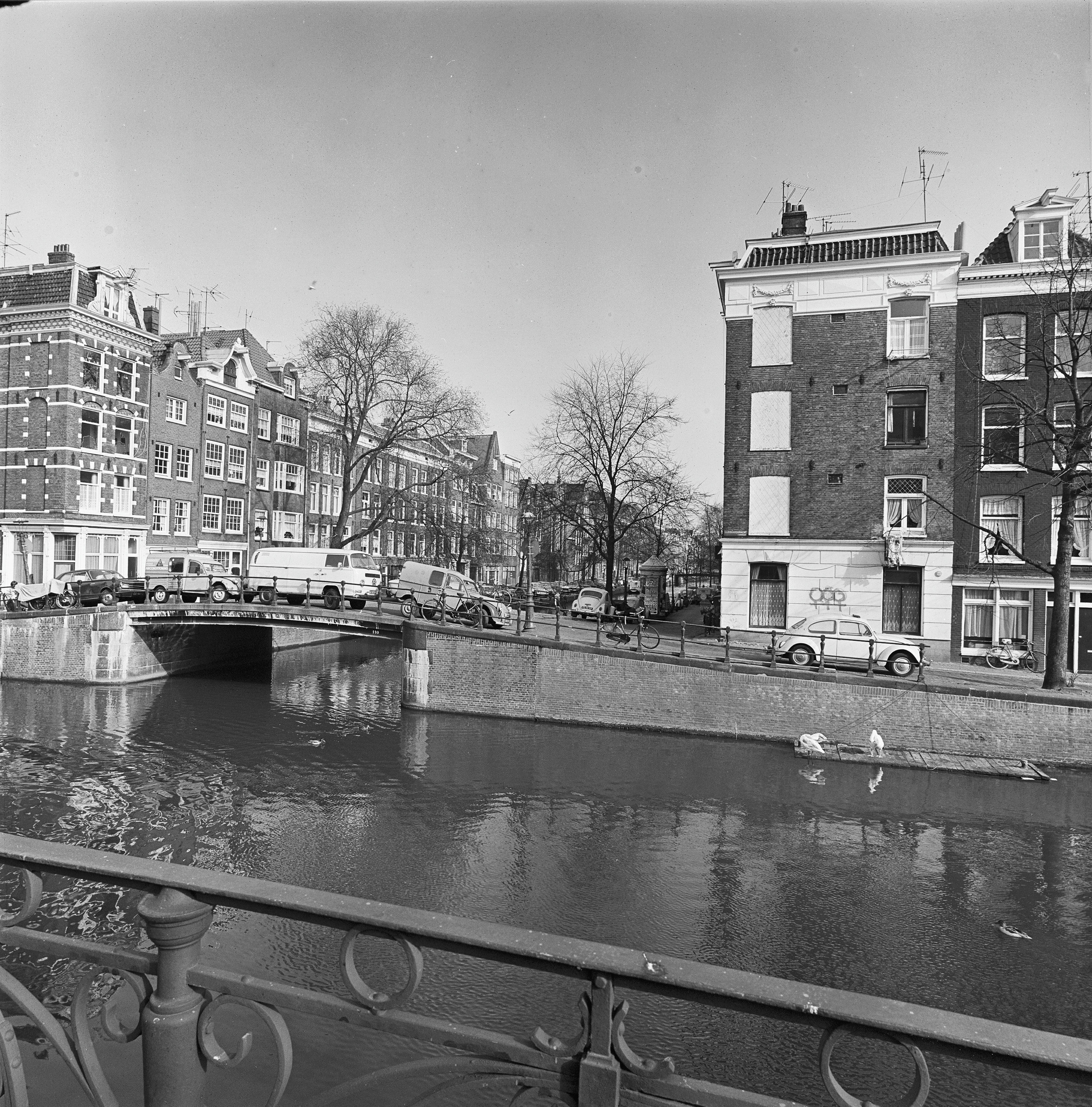 overzicht hoek Lauriergracht